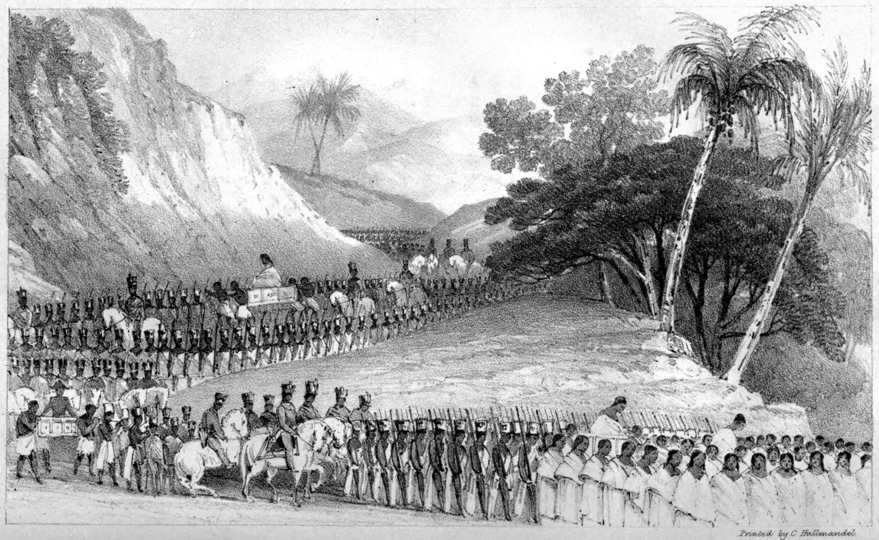 Opstoet van de kroningsoptocht